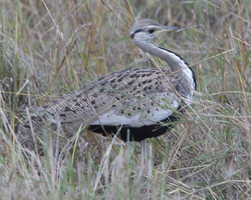 Lissotis melanogaster